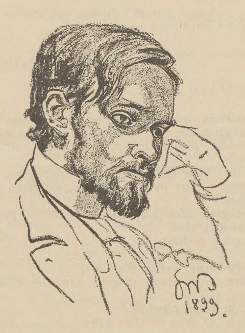 Portret Jana Augusta Kisielewskiego